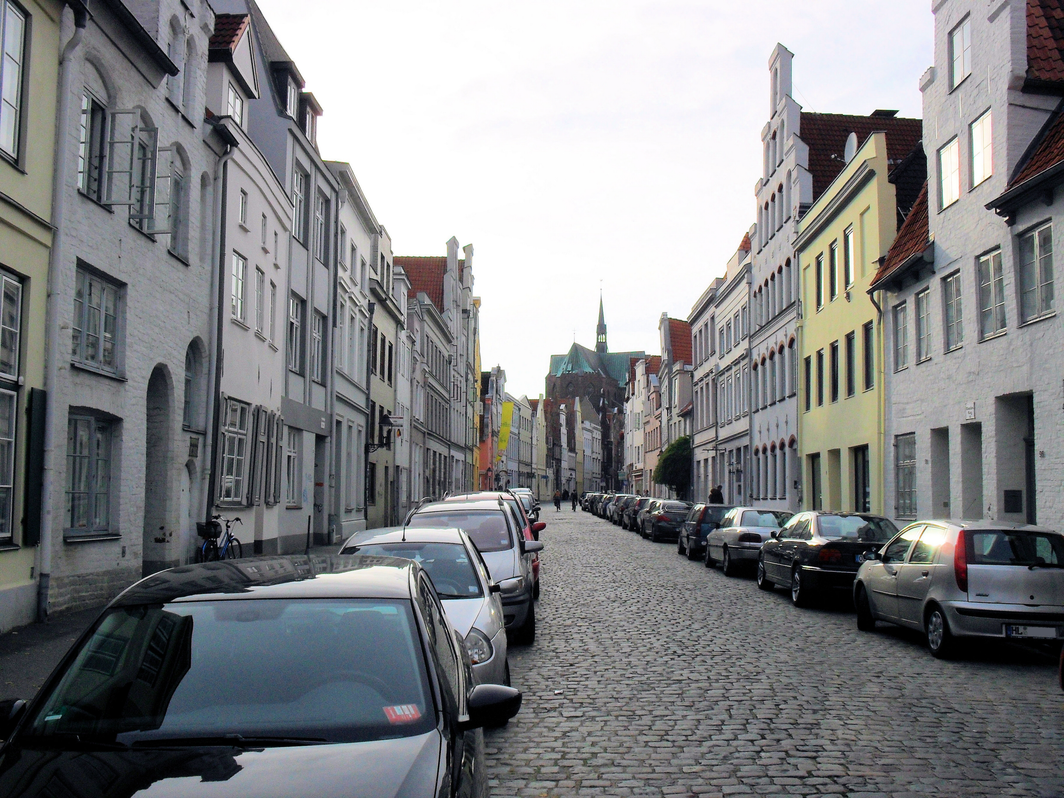 Die Glockengießerstraße in Lübeck